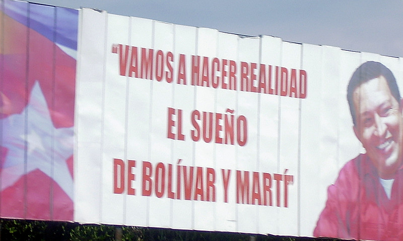 Plakat nahe Havanna auf dem Hugo Chávez zu sehen ist. Übersetzung:"wir leben den Traum von Bolivar und Marti"